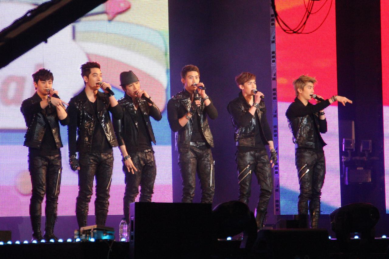 싸이월드 페스티벌_125